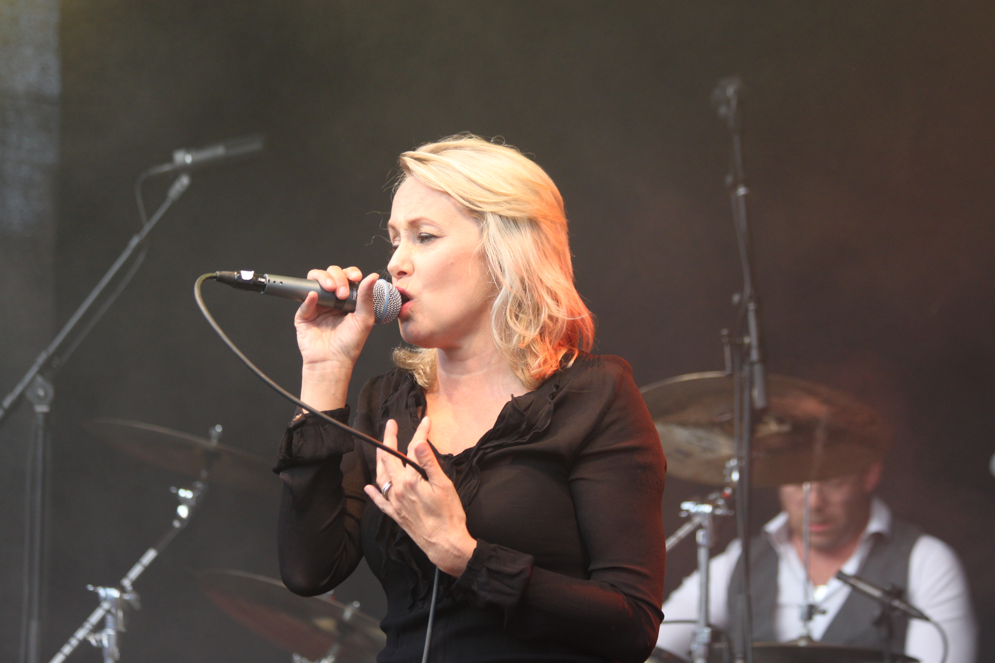 Louise Hoffsten live i Södertälje. 4 juli 2013.